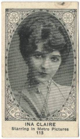 Ina Claire